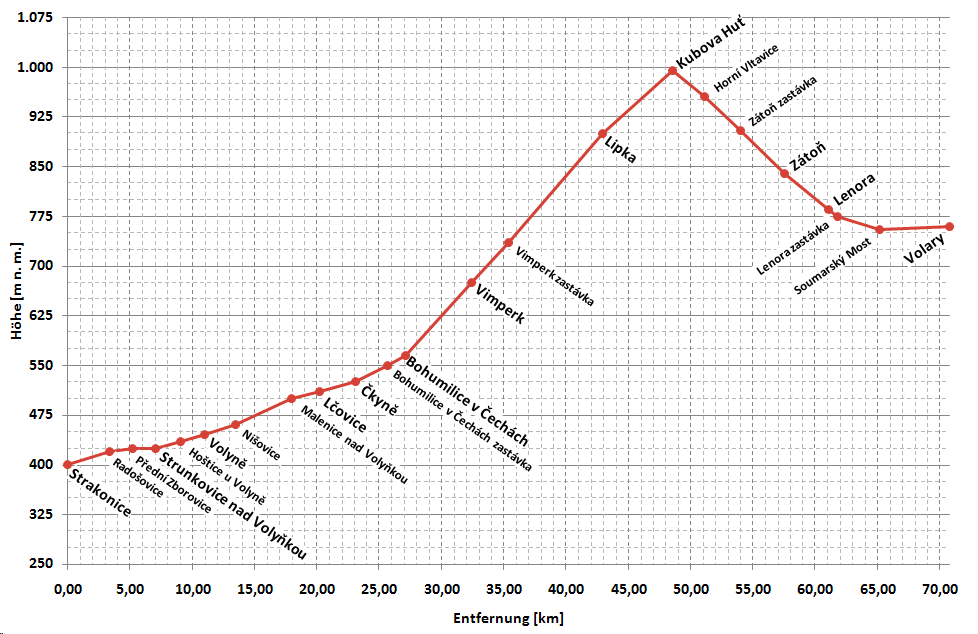 vereinfachtes Höhenprofil der Bahnstrecke Strakonice-Volary